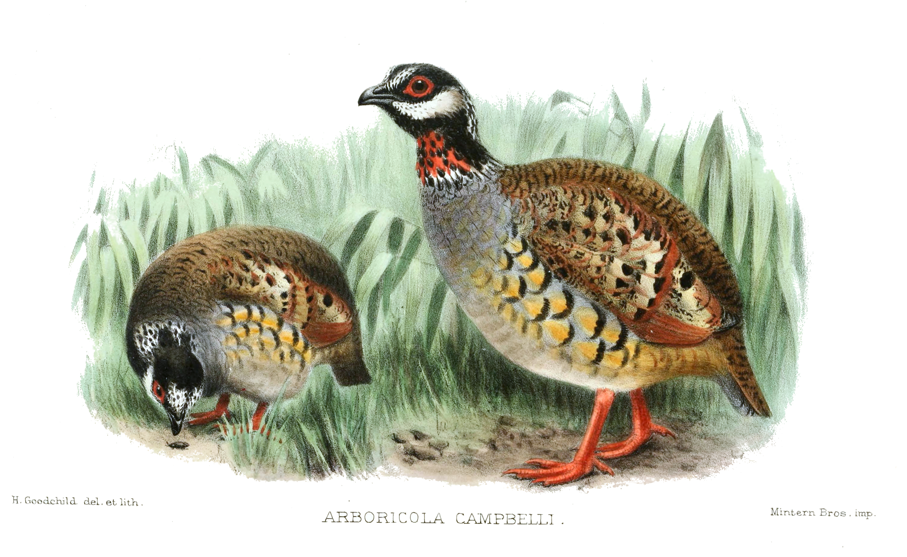 Arboricola campbelli = Arborophila campbelli